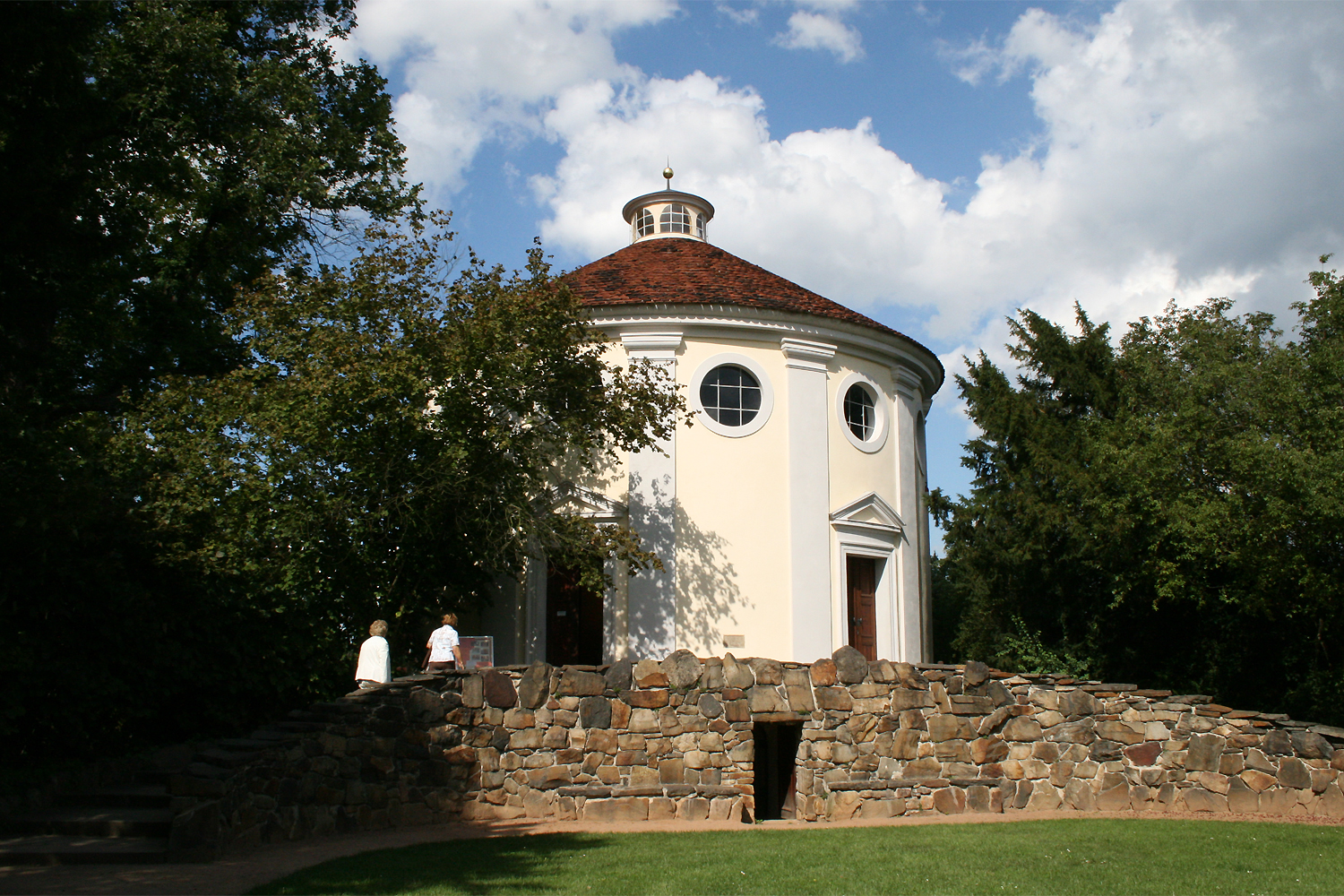 woerlitz synagoge/ synagogue